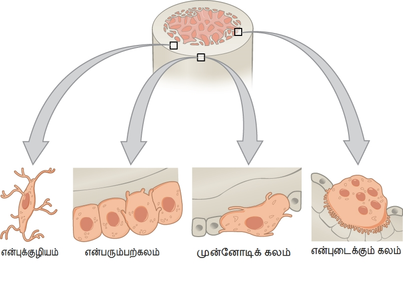 என்பிழையக் கலங்கள்